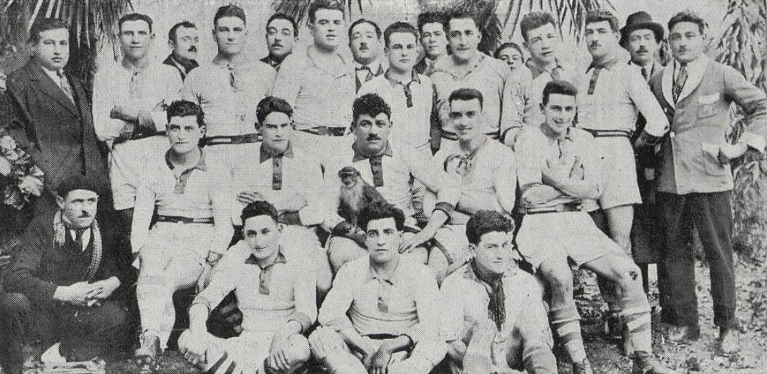 Le Football-Club Lézignanais, saison 1926-1927.